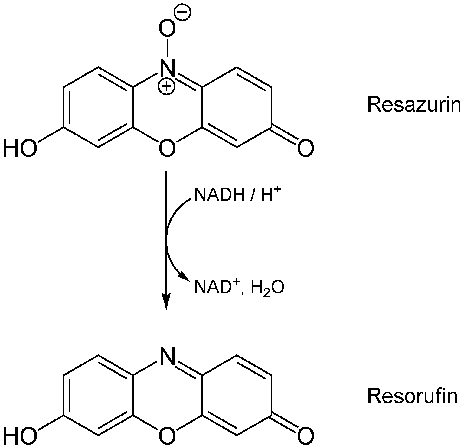 Reduktion von Resazurin zu Resorufin in lebenden Zellen